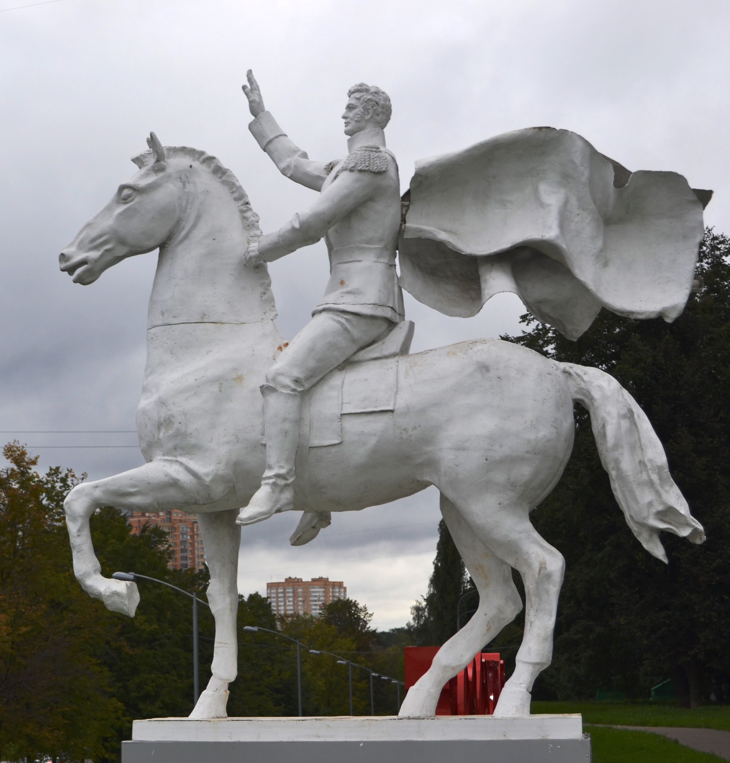 Памятник